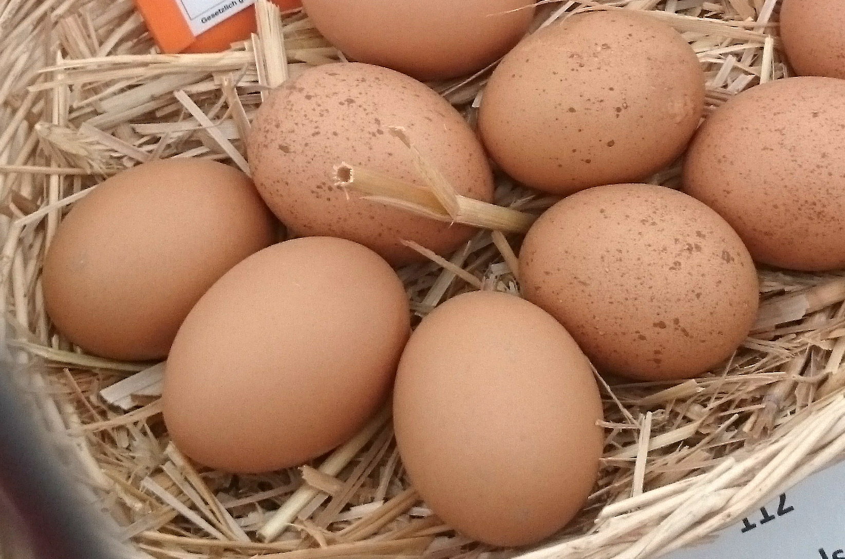 Eier der Zwerg Welsumer auf der BraLa (Brandenburgische Landwirtschaftsausstellung) in Paaren/Glien